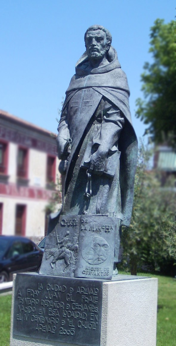 Monumento a Fr. Juan Gil en Arévalo